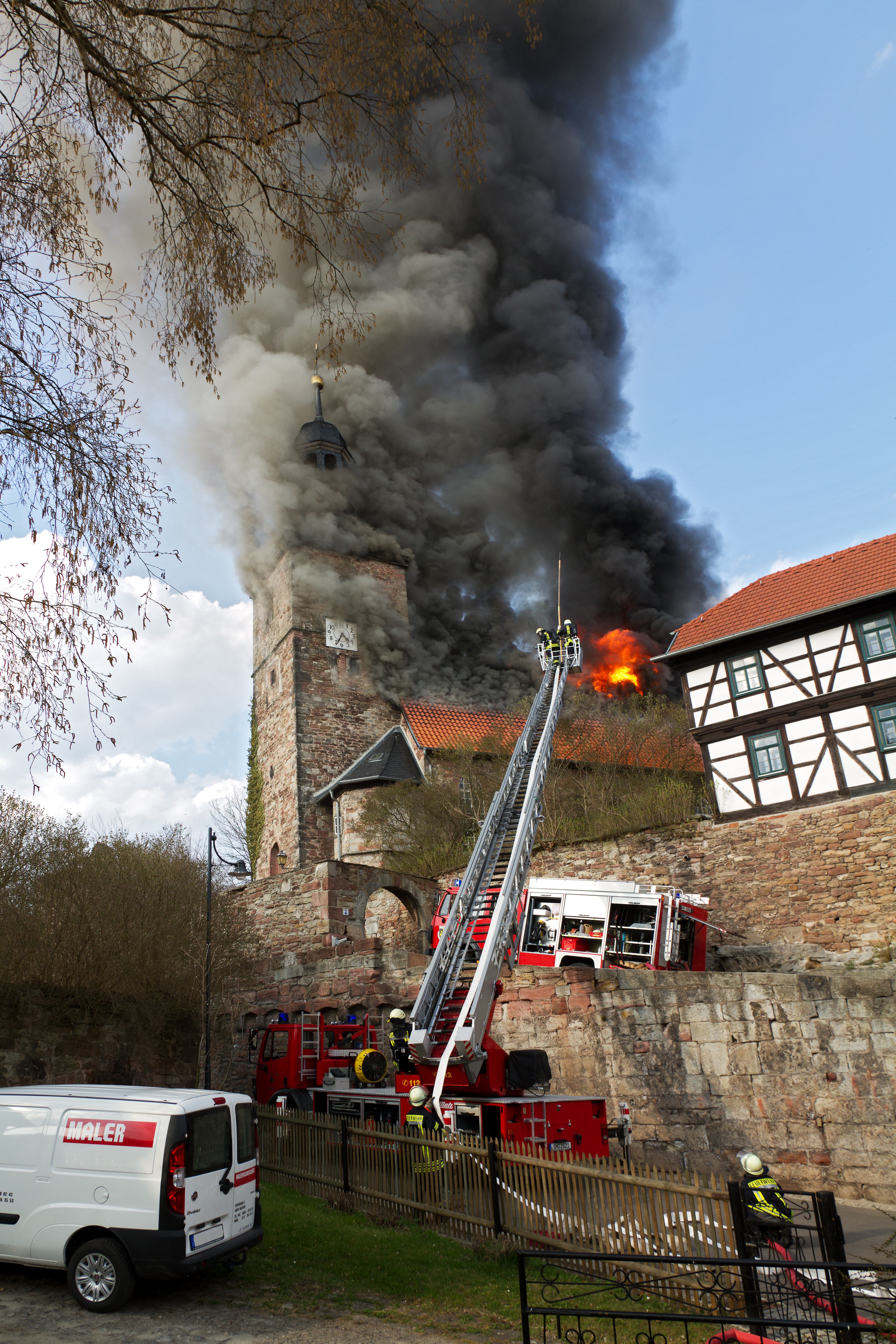 Der Abbrand der Kirchenburg Walldorf am 3. 4. 2012